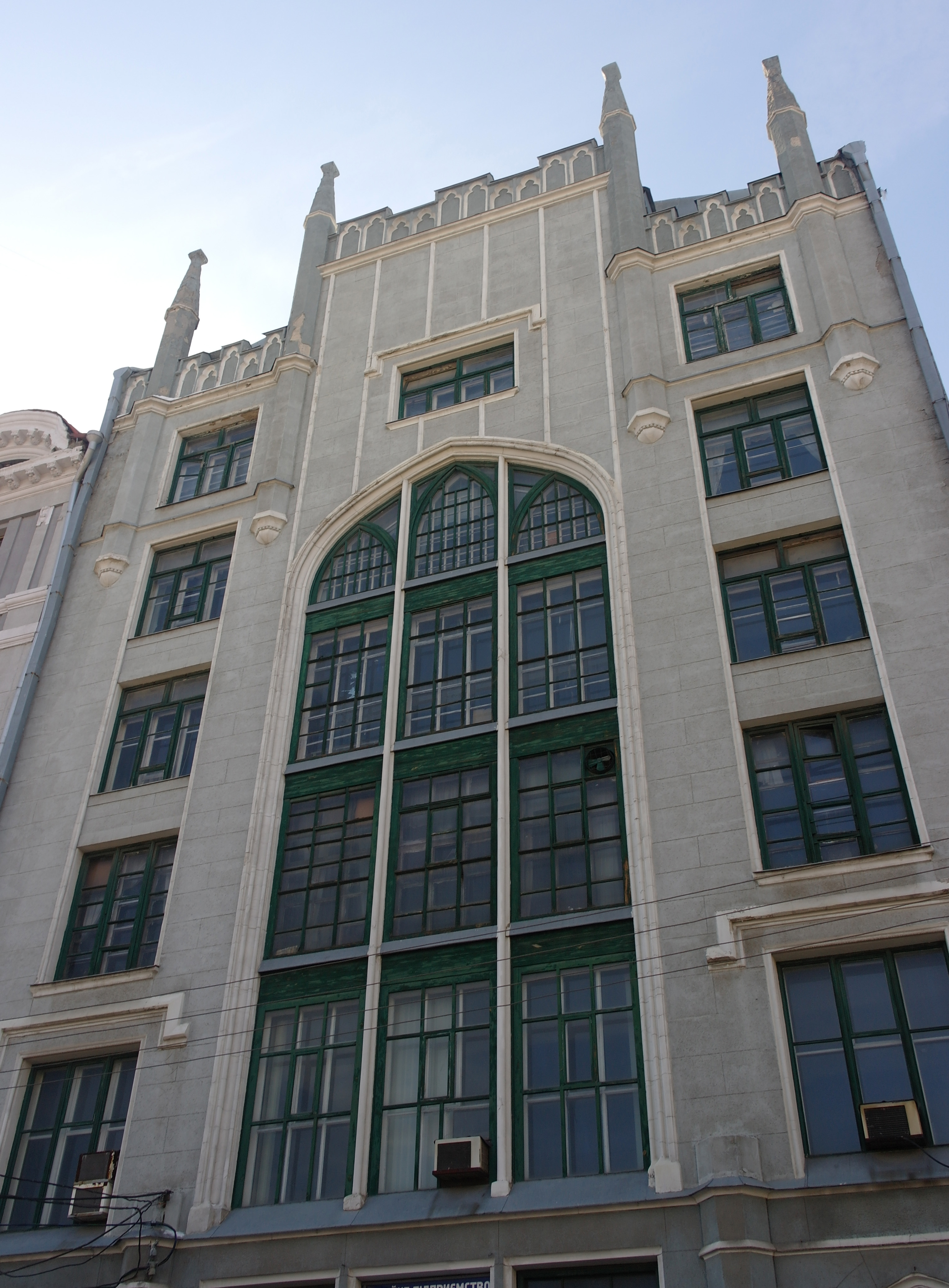 Харків, Енгельса, 9 мануфактура